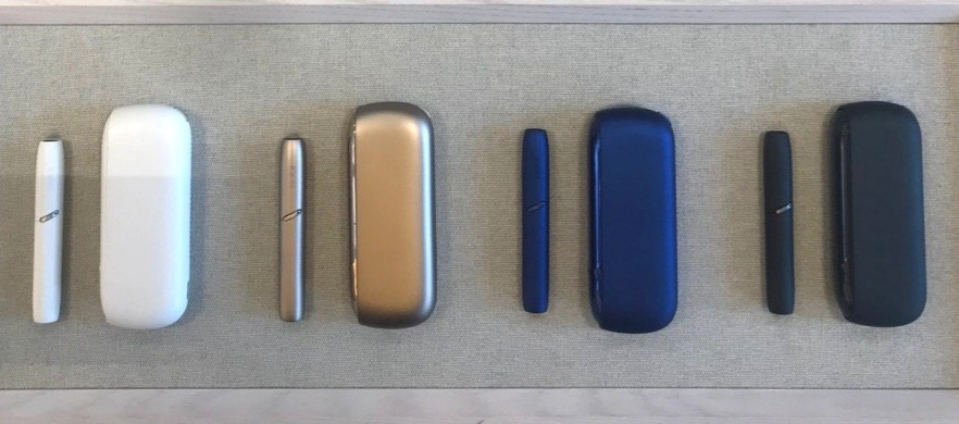 IQOS 3 в разных цветовых решениях